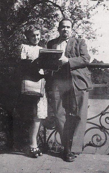 Emil Smetana, pierwszy prorektor WSP we Wrocławiu z żoną